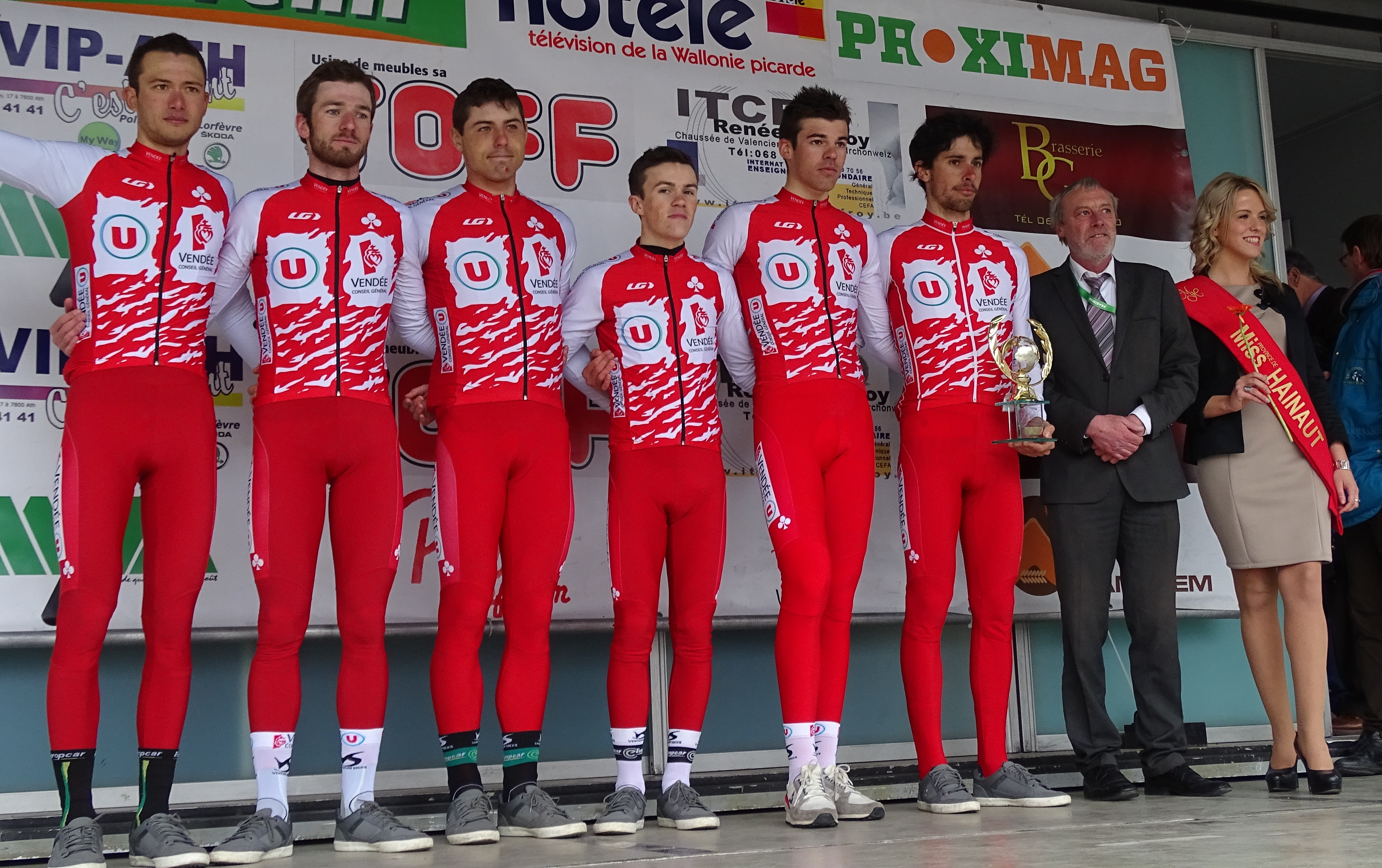 Triptyque des Monts et Châteaux 2015 Depicted team: Vendée U